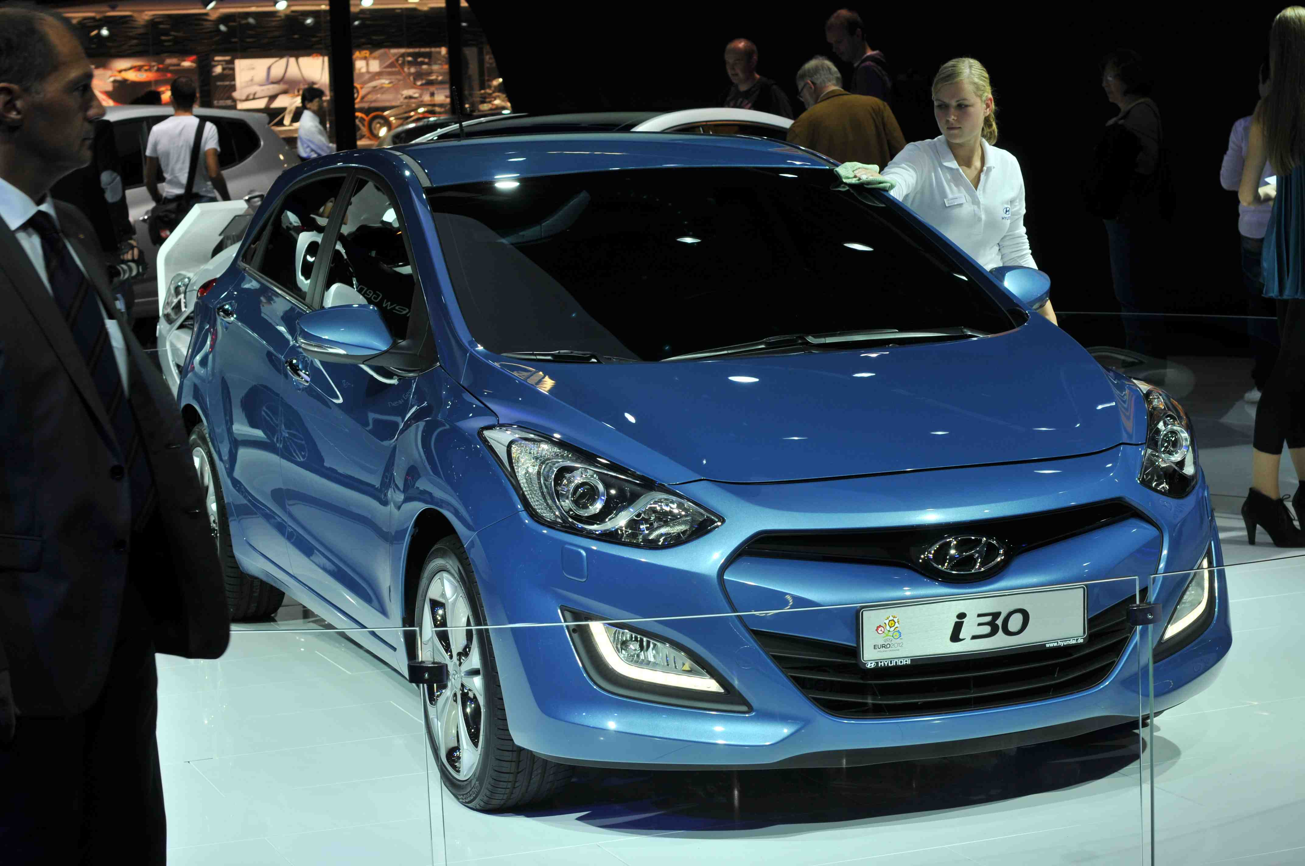 IAA 2011 - Internationale Automobilausstellung in Frankfurt/Main